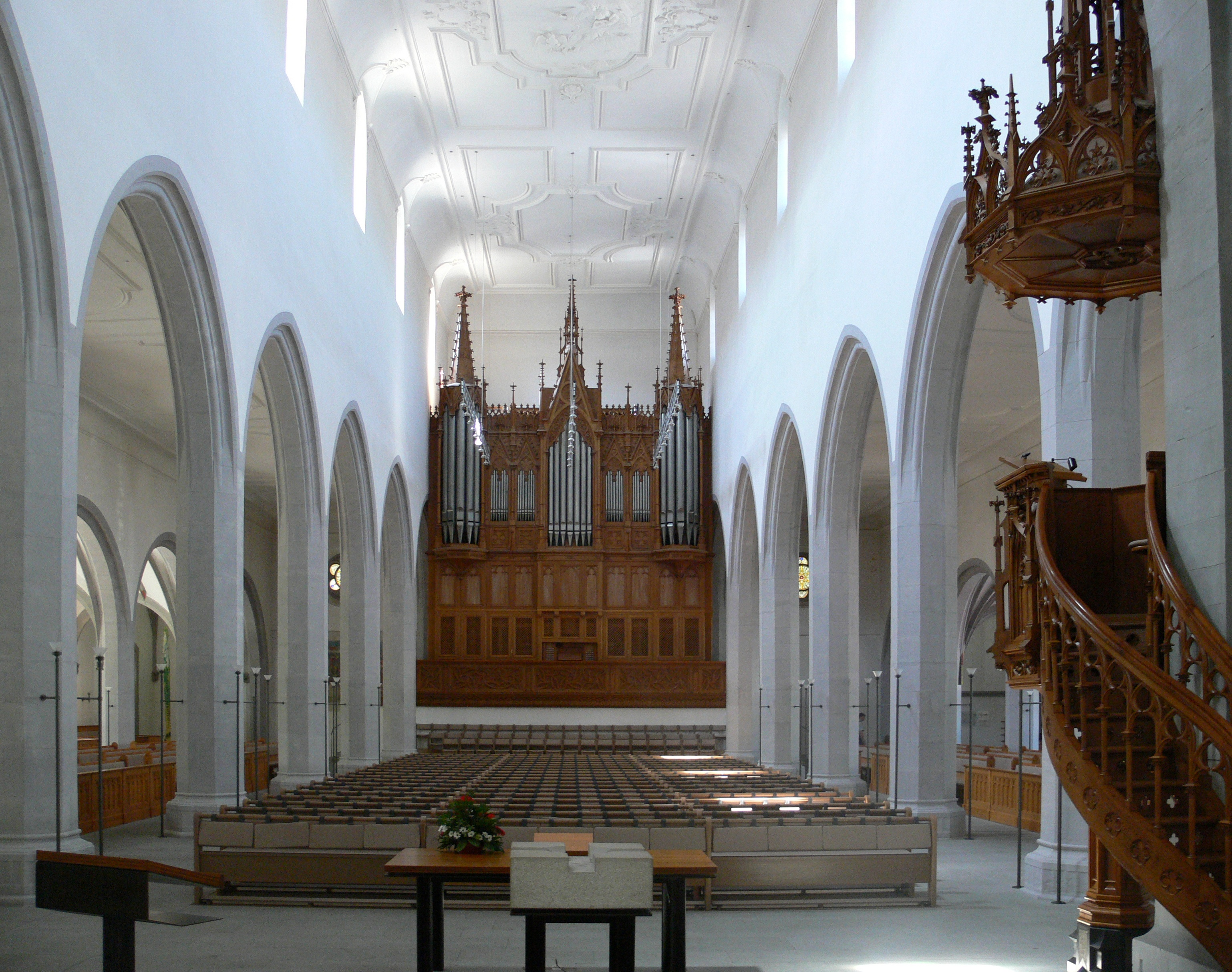 Kirche St. Johann, Schaffhausen